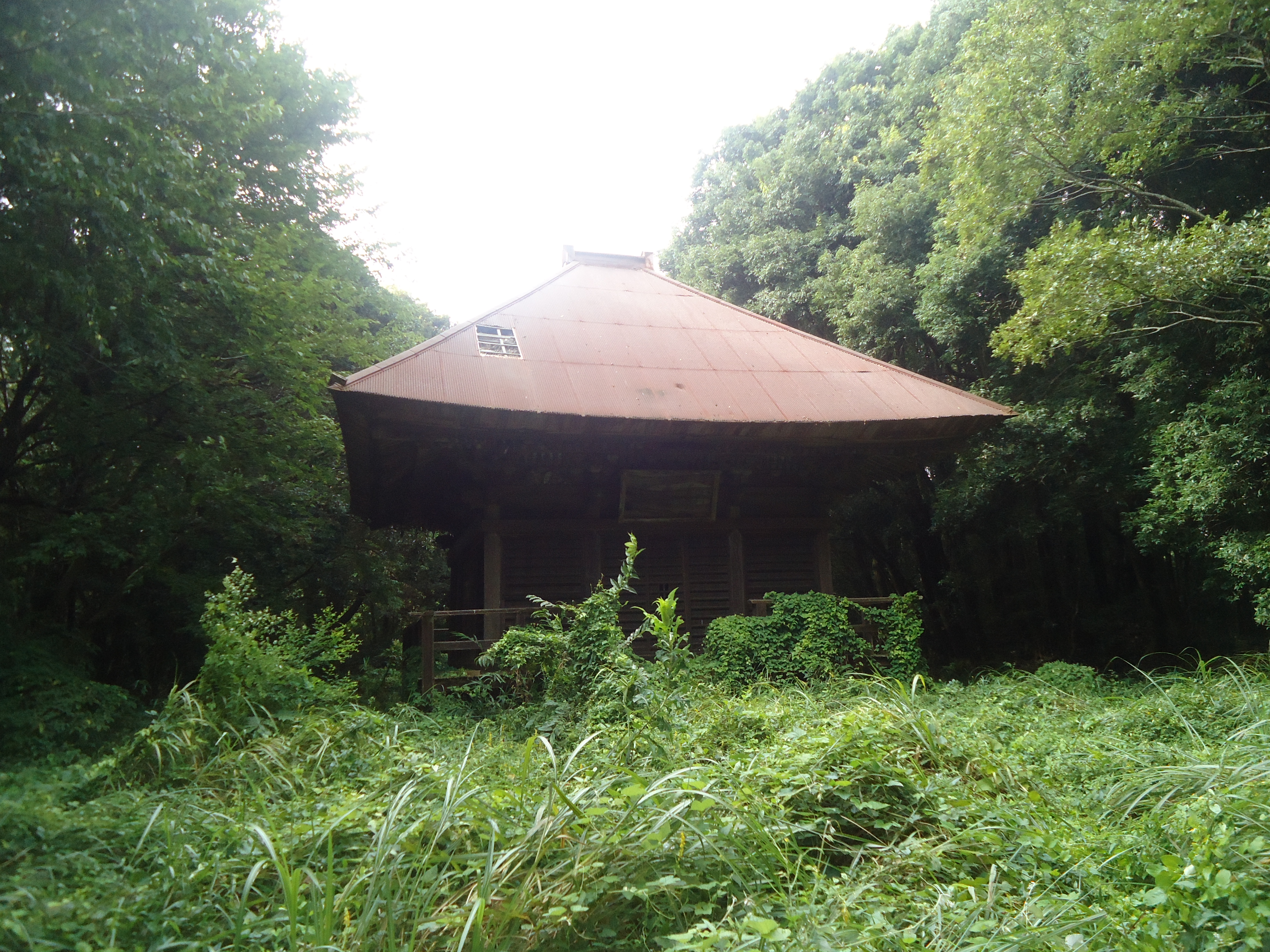 茨城県土浦市沖宿町 2014年撮影